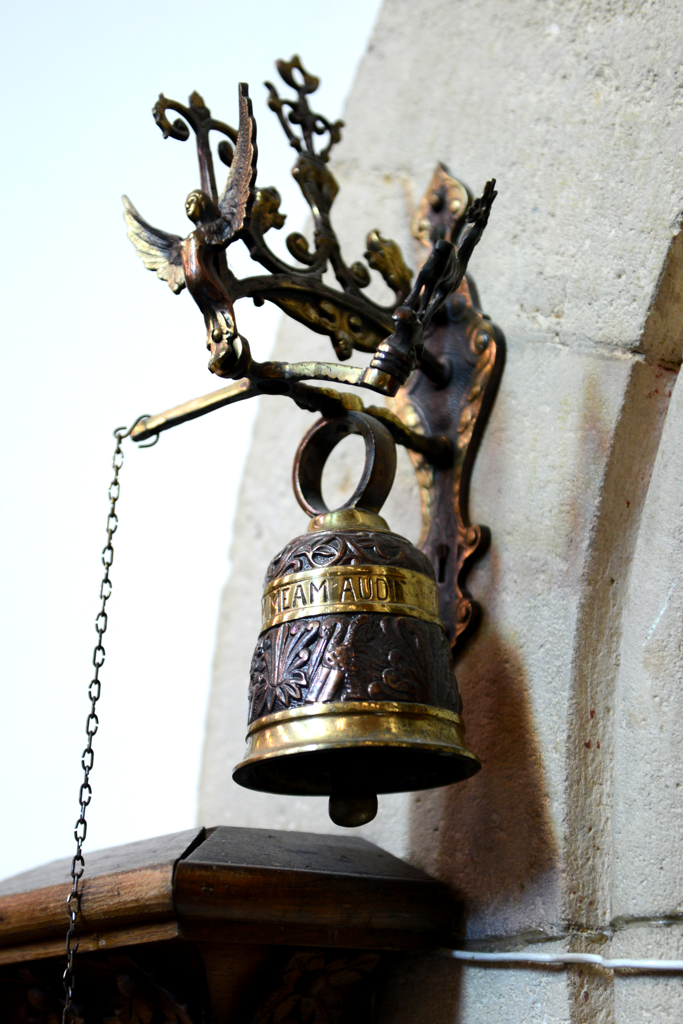 Am Chouer, bei der Sakristei an der Beetebuerger Kierch, eng kleng Qui me tangit vocem meam audit-Klack.